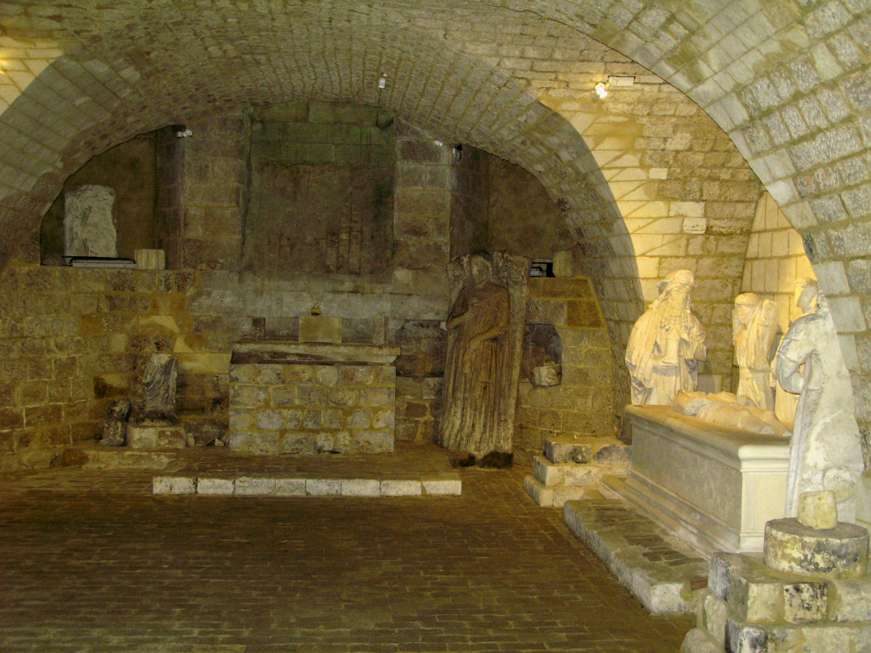 Longpré-les-Corps-Saints (Somme, France) - .